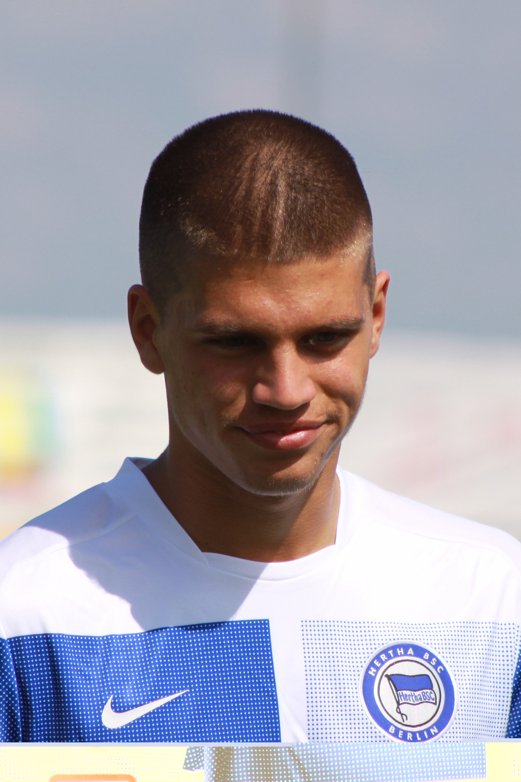 Lennart Hartmann – Hertha BSC Berlin (1)